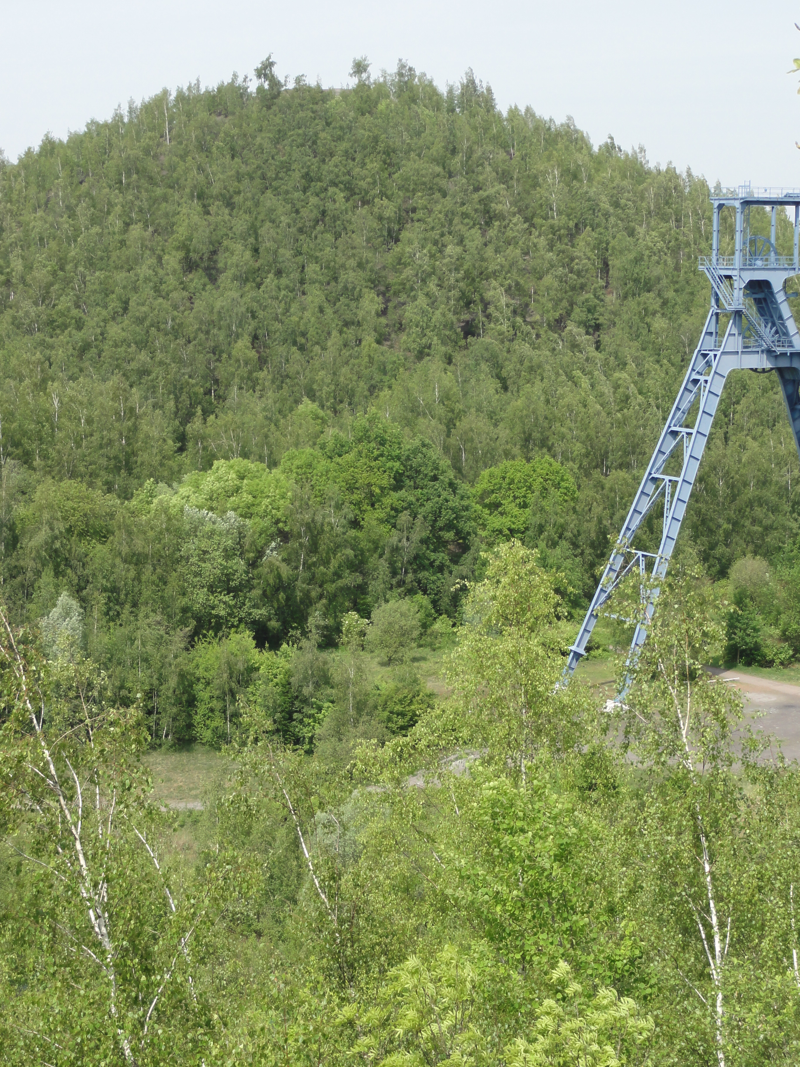 Terril n° 175 dit Sabatier Nord, Fosse Sabatier de la Compagnie des mines d'Anzin, Raismes, Nord, Nord-Pas-de-Calais, France.